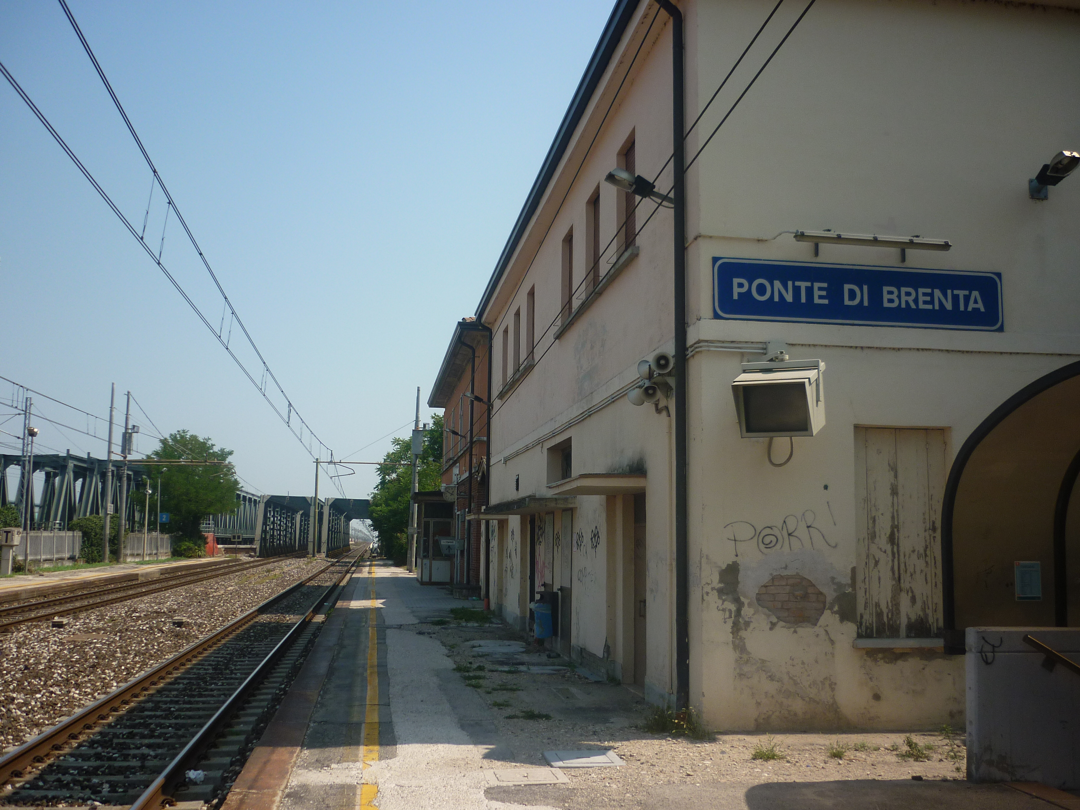 Ex fermata di Ponte di Brenta, soppressa dal 13 dicembre 2015